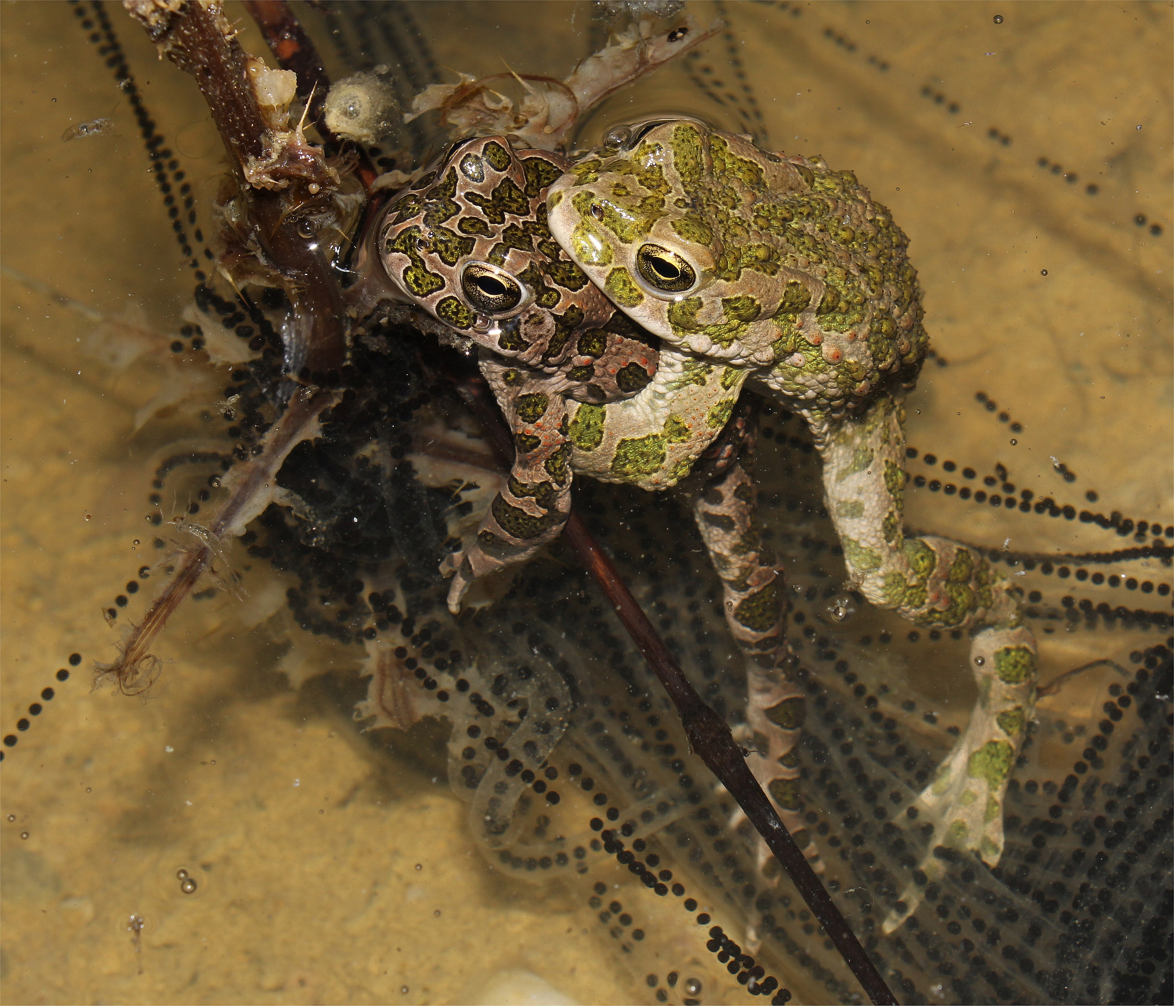 Laichende Wechselkröten im Amplexus, Bornheim Hersel, 2020